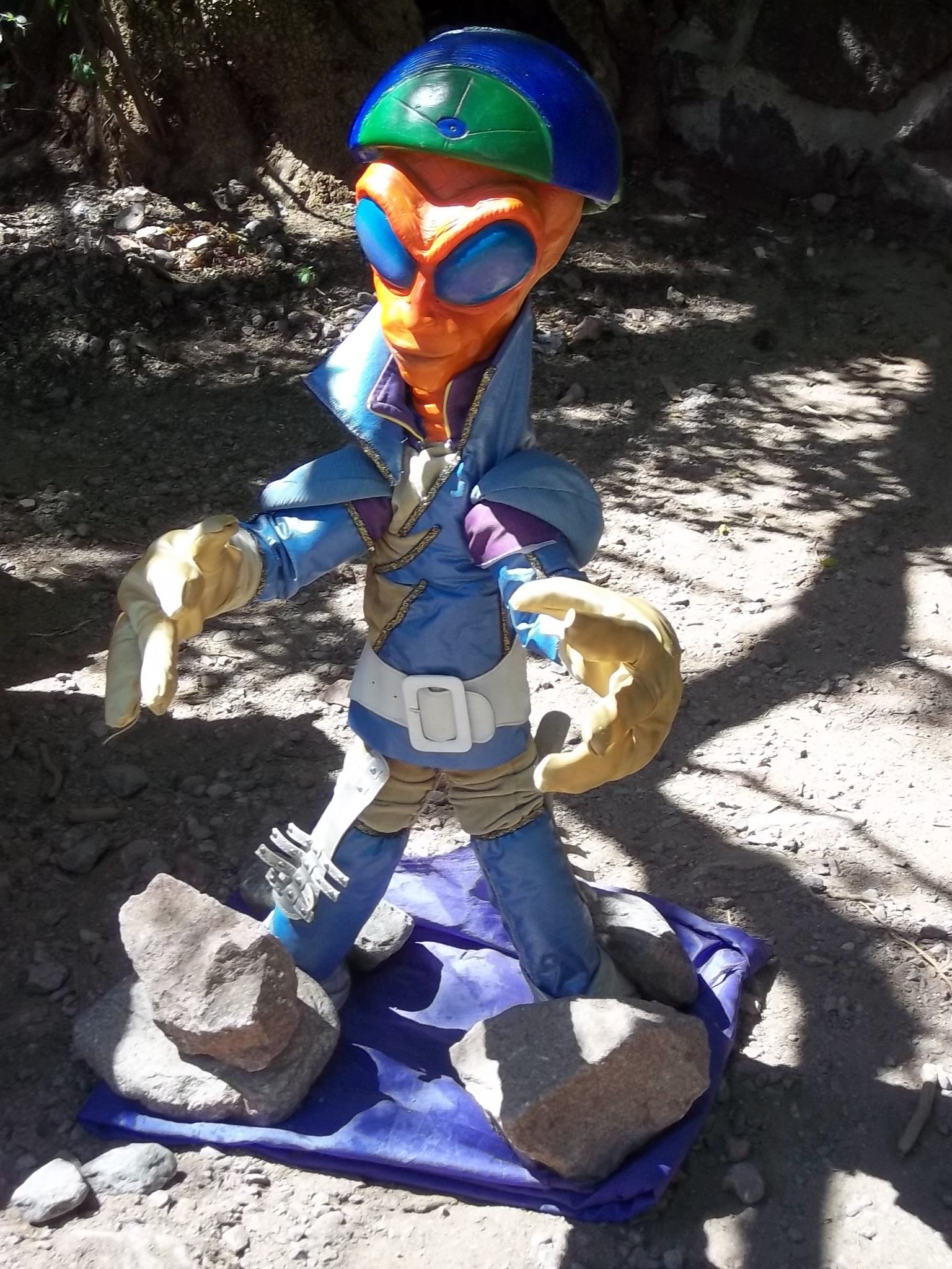 Desde los años '80, la zona se caracteriza por cultivar un novedoso turismo OVNI, en conjunción con cultores de la ERA DE ACUARIO. La localidad cuenta con aproximadamente 80 sectas de culto.